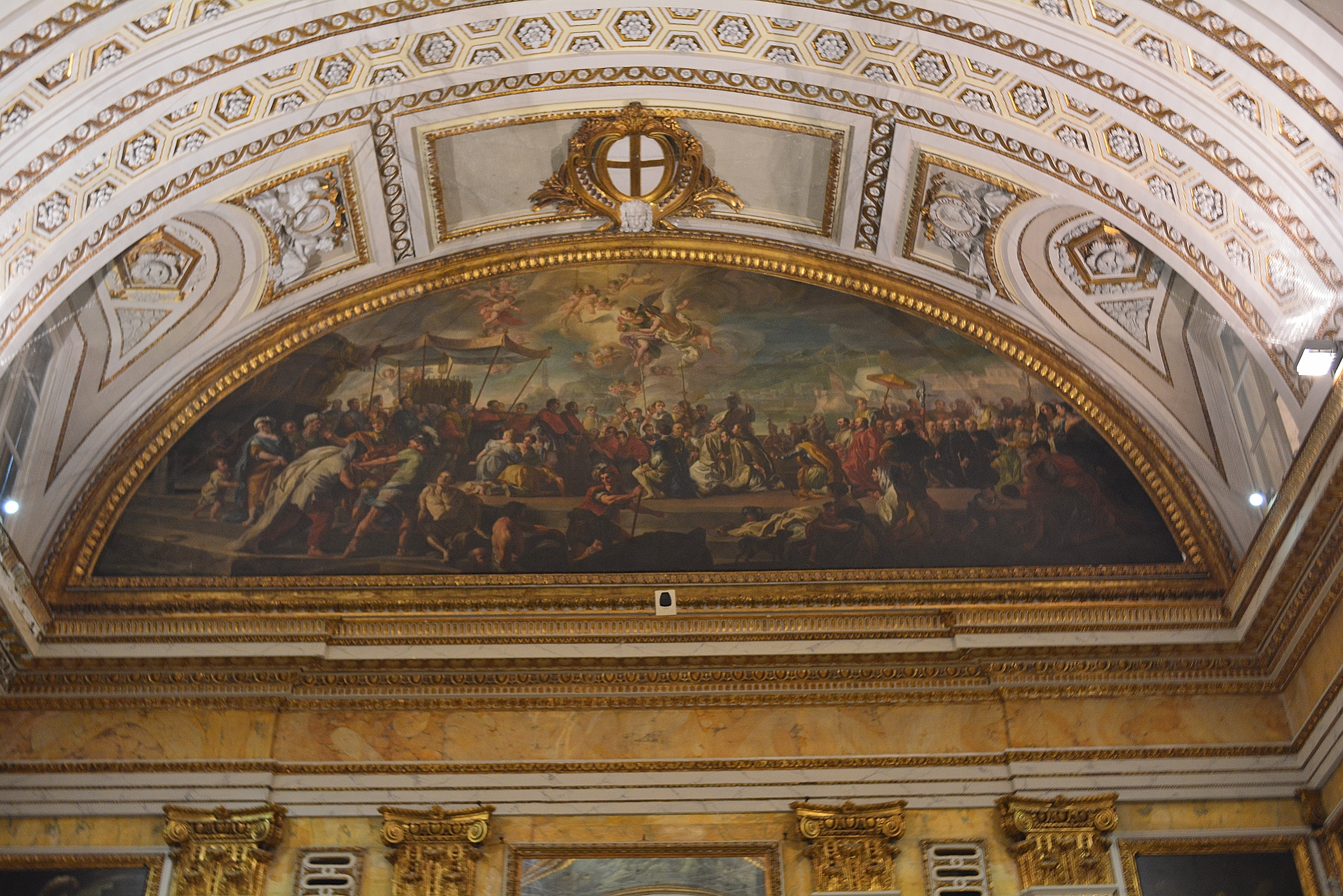 Sala del Minor Consiglio, Palazzo Ducale, Genova, Liguria, Italia This is a photo of a monument which is part of cultural heritage of Italy.